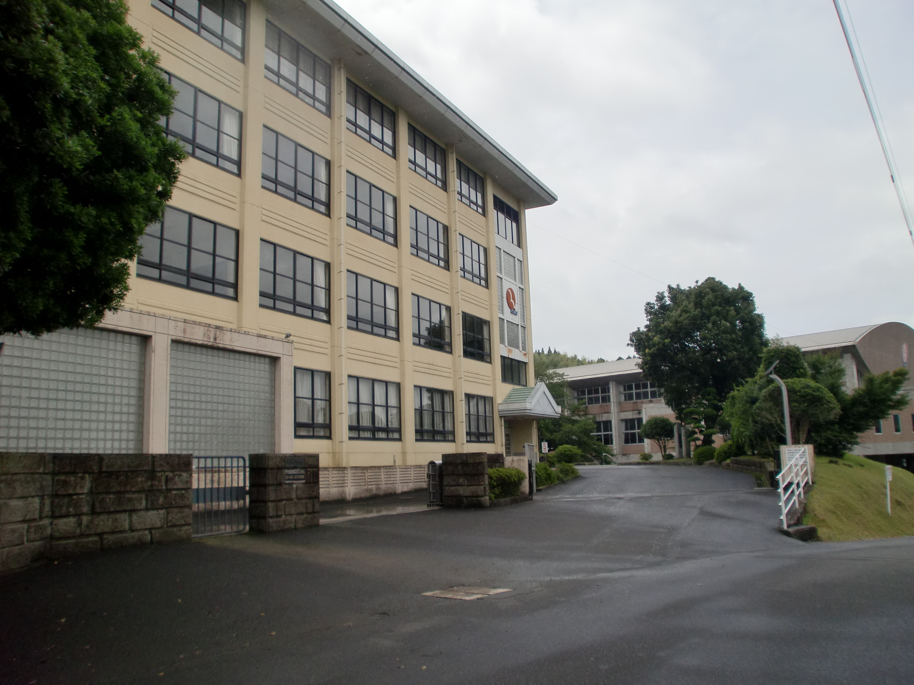 れいめい中学校・高等学校の外観。